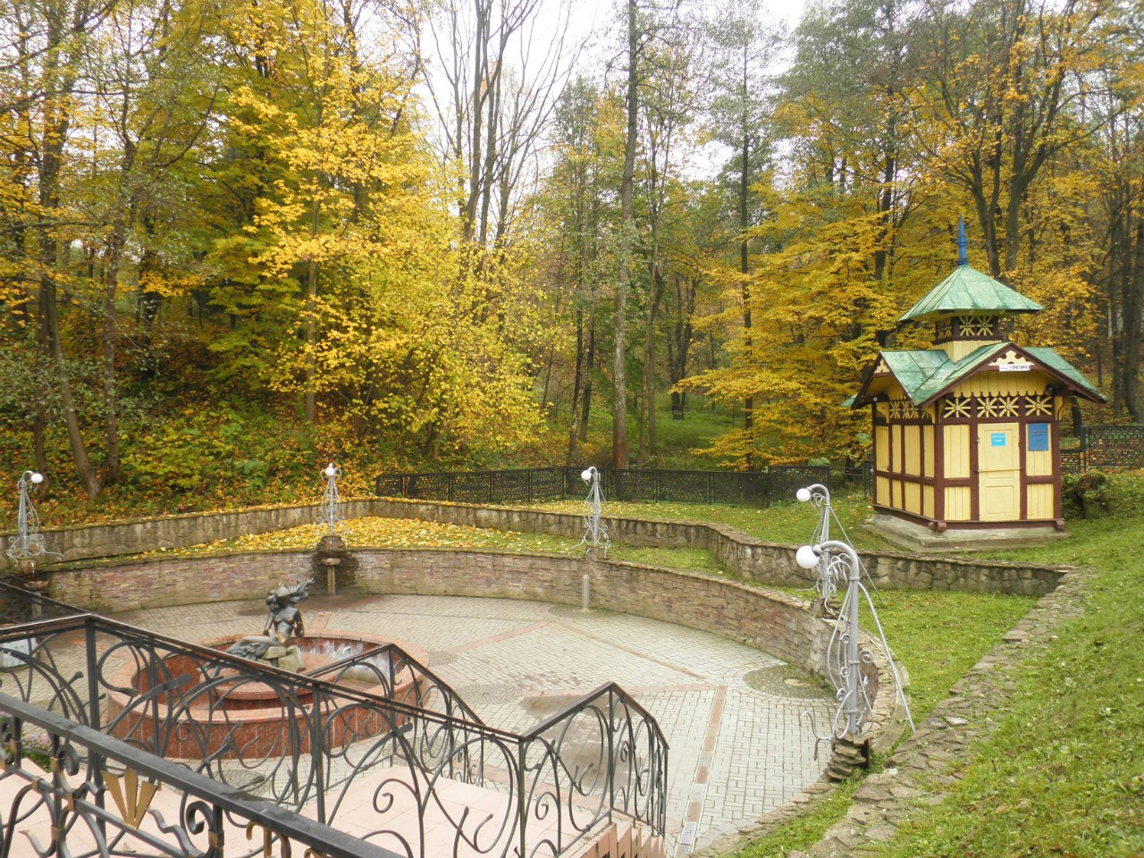 Джерело № 11 (колишня «Юзя») курорту «Трускавець»